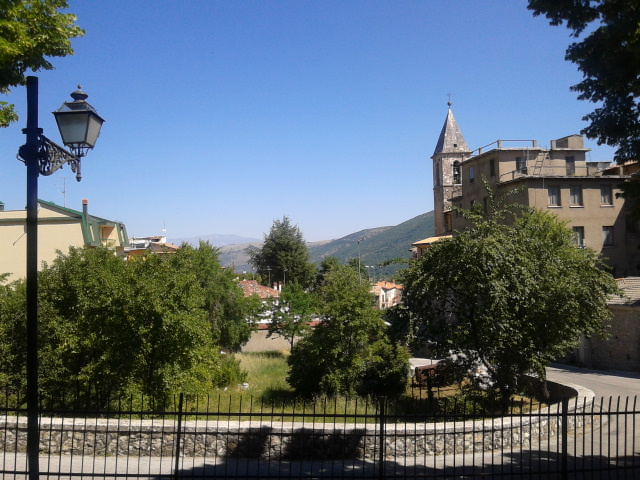 Foto panoramica da piazza San Rocco a Collelongo